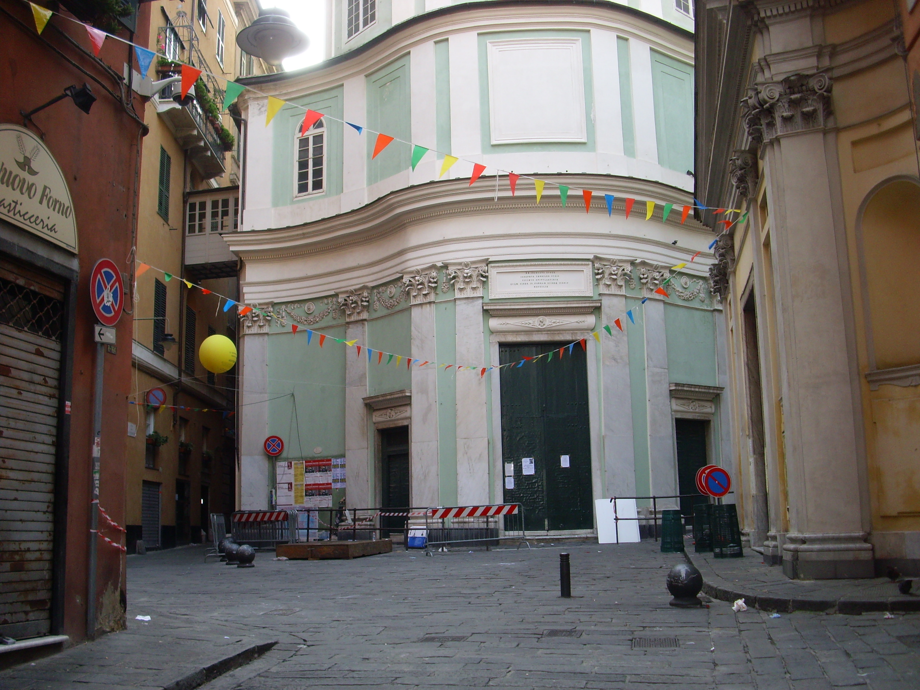 La chiesa di San Giorgio a Genova, nell'omonima piazza. A destra il profilo della chiesa di San Torpete.